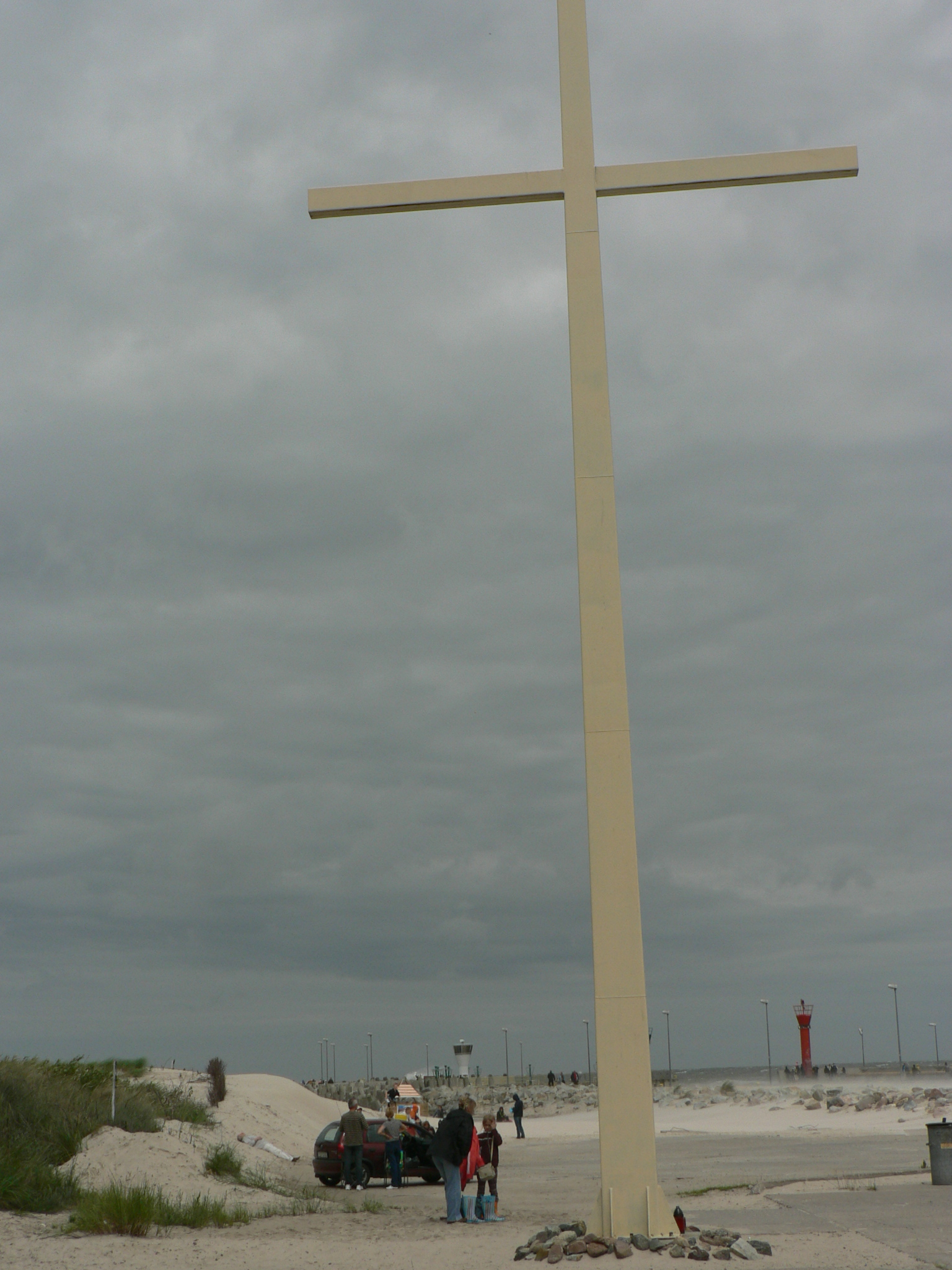 Emlékkereszt a Wilhelm Gustloff személyszállító hajó 1945-ös tragédiájának közelében (Łeba, Lengyelország)